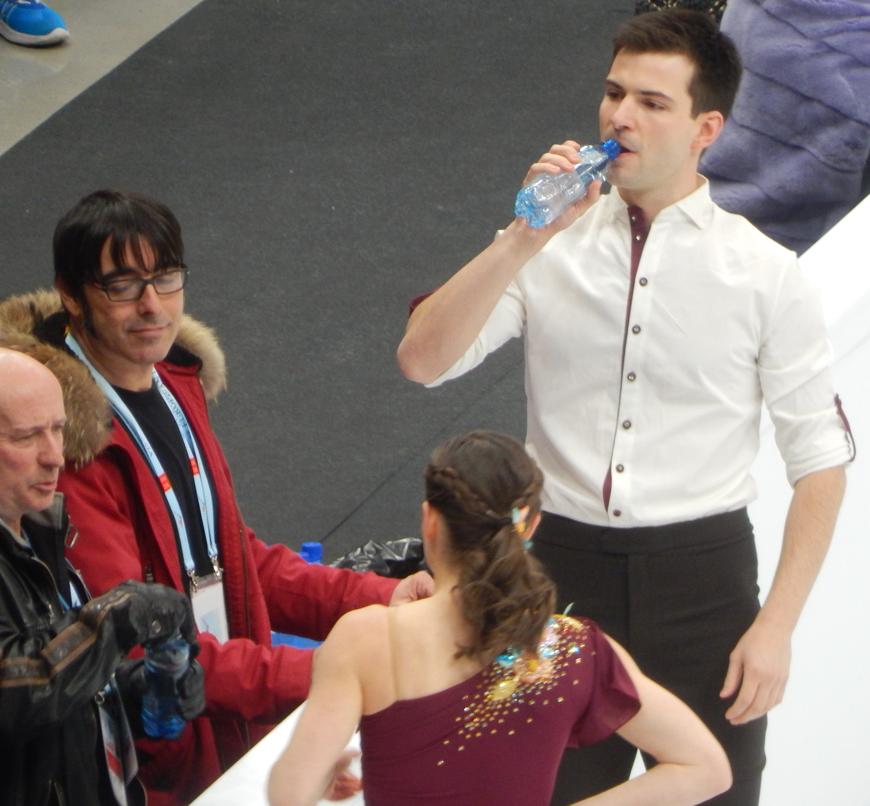 Чемпионат Европы по фигурному катанию 2018 в Москве. Первый день соревнований (17 января). Пара из Австрии Мириам Циглер и Зеверин Кифер и их тренеры